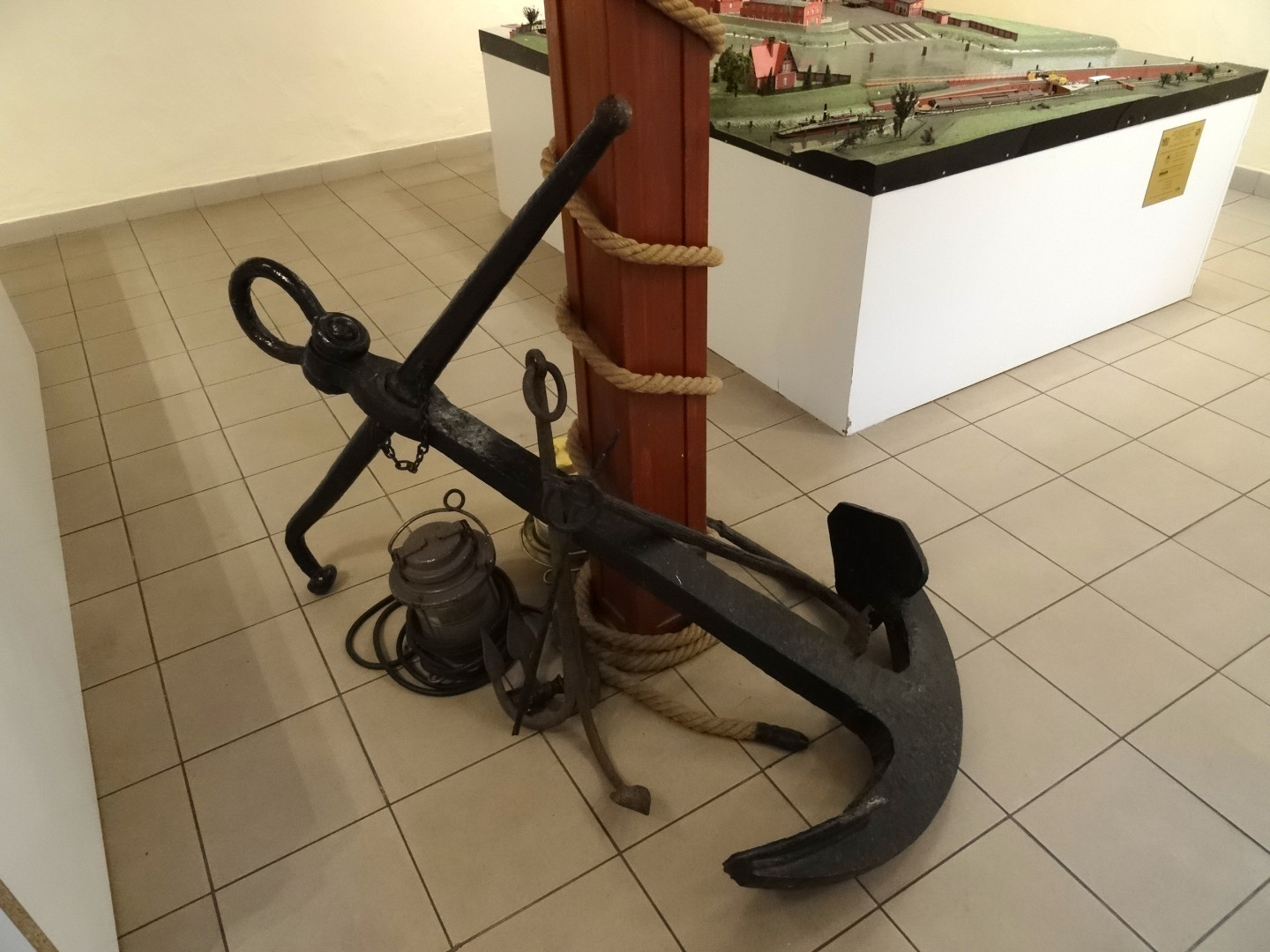 Muzeum Kanału Bydgoskiego w Bydgoszczy (przy budynku III L.O.)